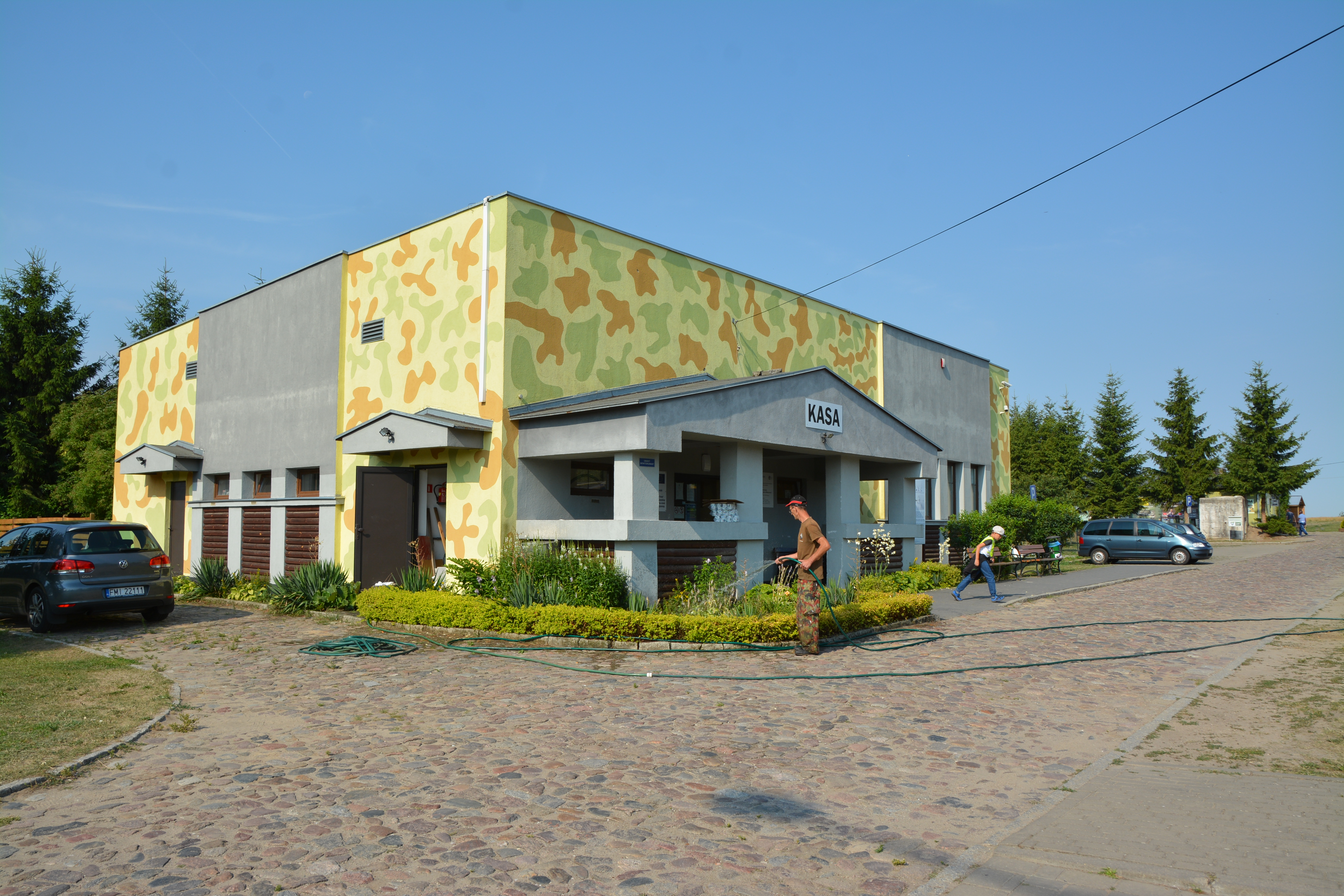 MRU - Muzeum Fortyfikacji i Nietoperzy w Pniewie